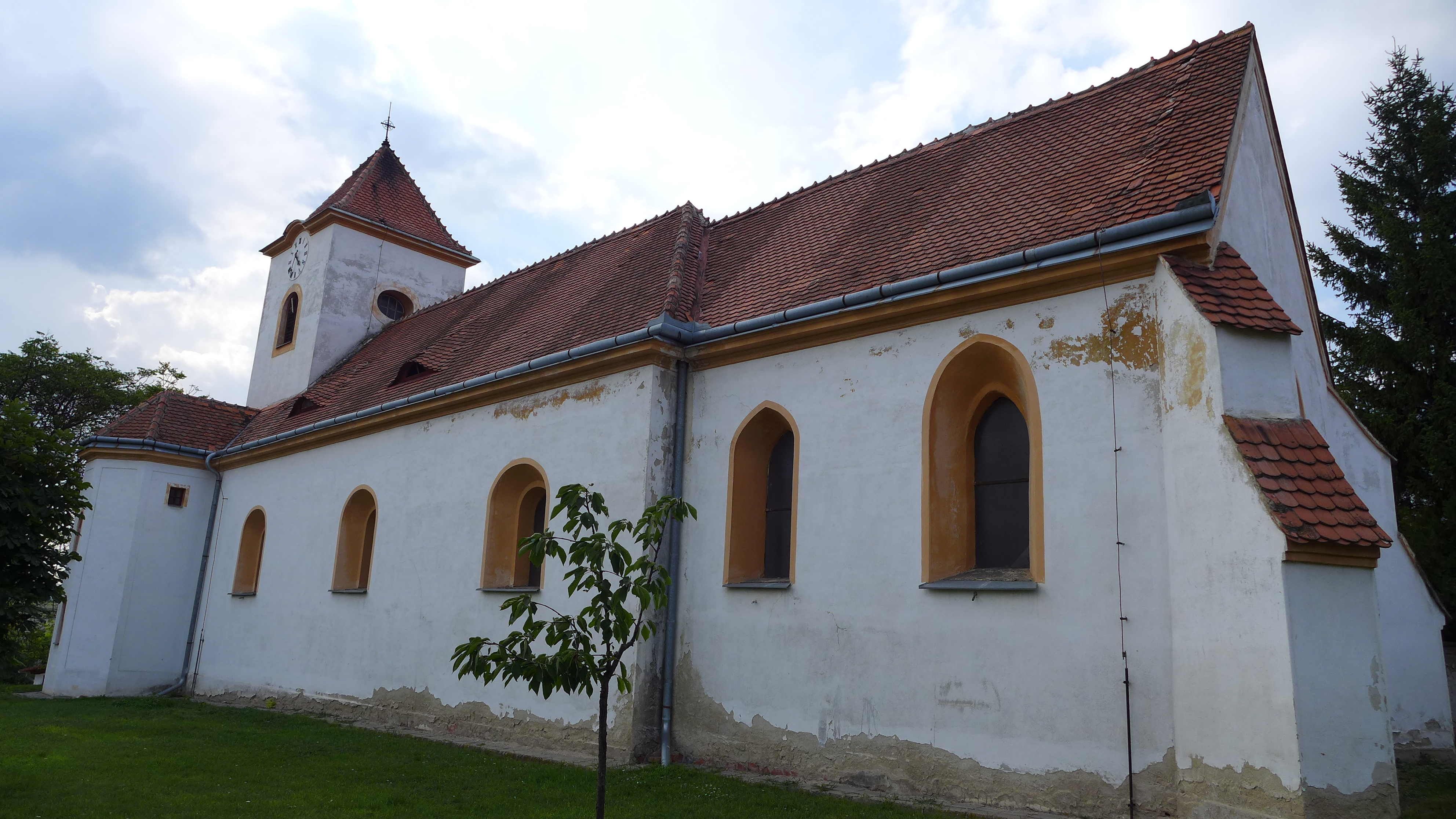 Kostel sv. Vavřince (Branišovice), Branišovice, J od obce, Branišovice, Branišovice.